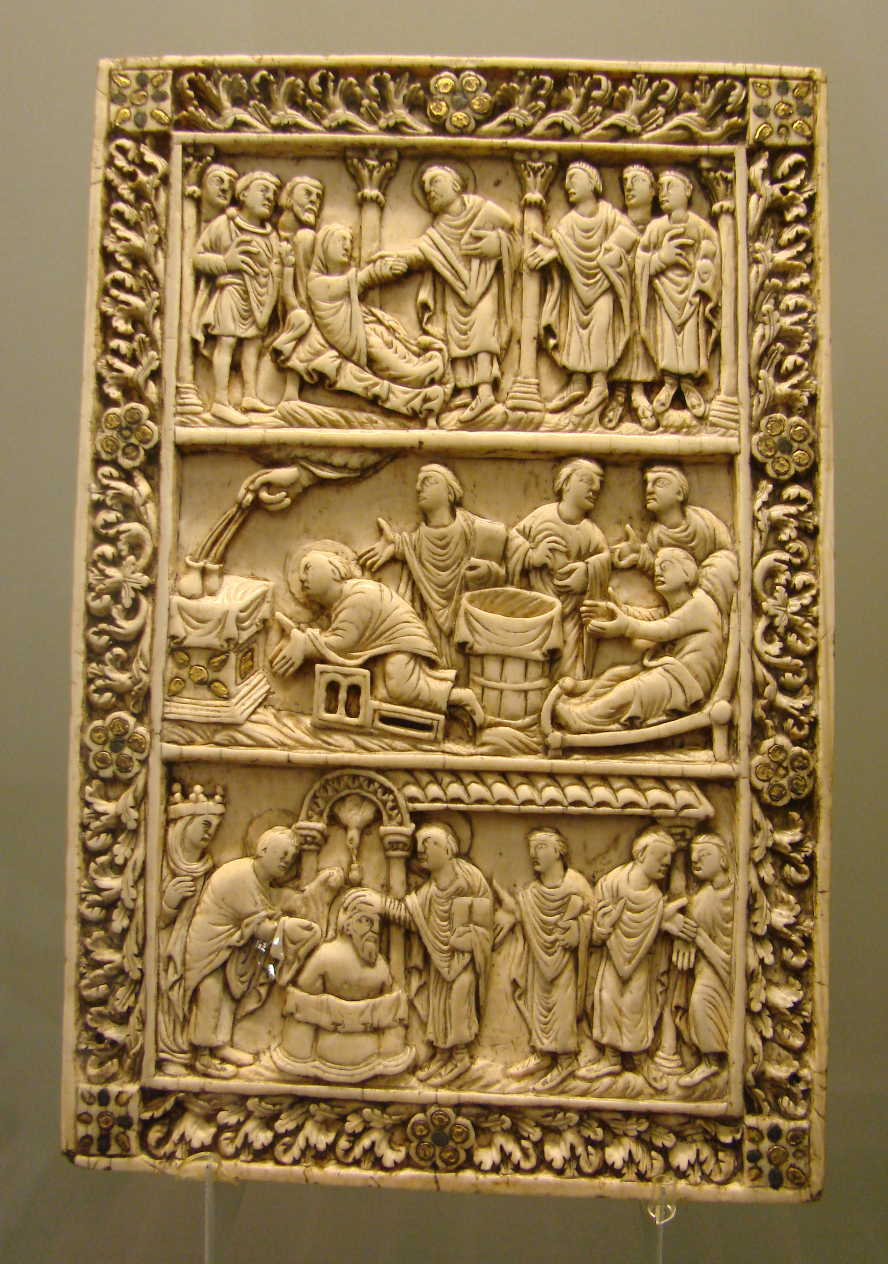 Plaque de reliure en ivoire, Reims, dernier quart du IXème siècle. Musée de Picardie à Amiens. Scènes de la vie de St Remi : au registre supérieur, St Remi ressuscite une jeune fille ; au centre : la Main de Dieu remplit deux flacons ; au registre inférieur, le baptême de Clovis avec le miracle de la Sainte Ampoule.